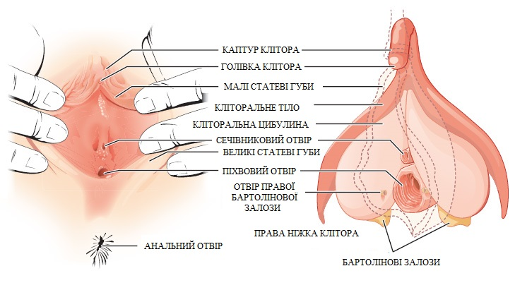 Будова жіночого клітора та навколишніх структур